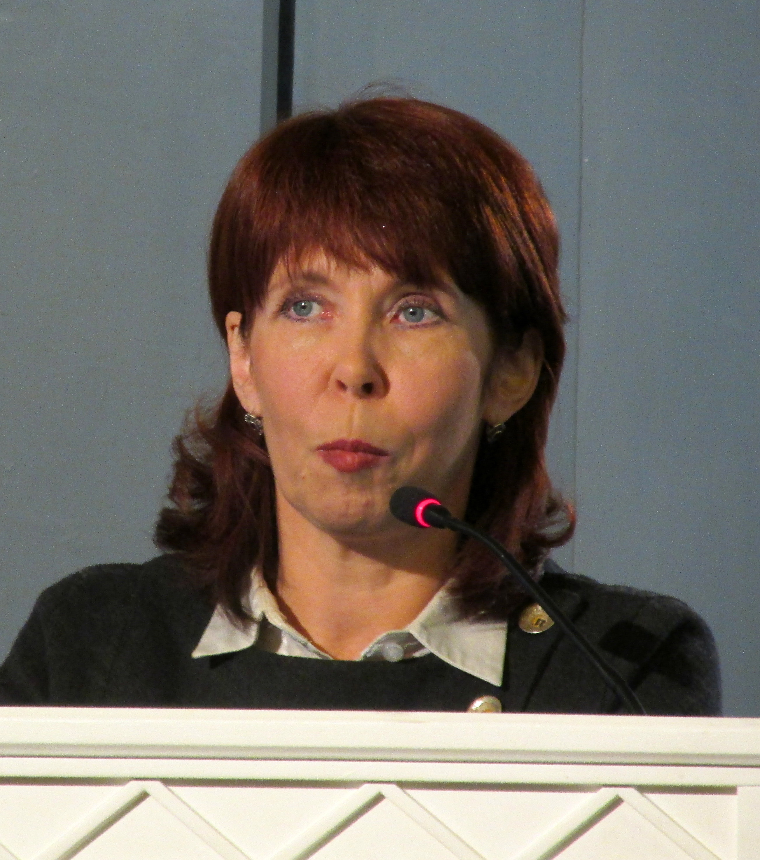 Filosoofiateaduskonna dekaan Margit Sutrop seminaril „Rahvusvahelised rahvusteadused rahvusülikoolis”.